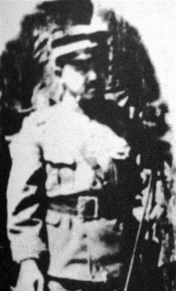 关玉衡，中国东北军将领。